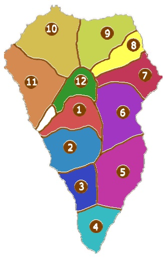 Mapa político de la isla de la Palma en tiempos aborígenes o prehispánicos con numeración